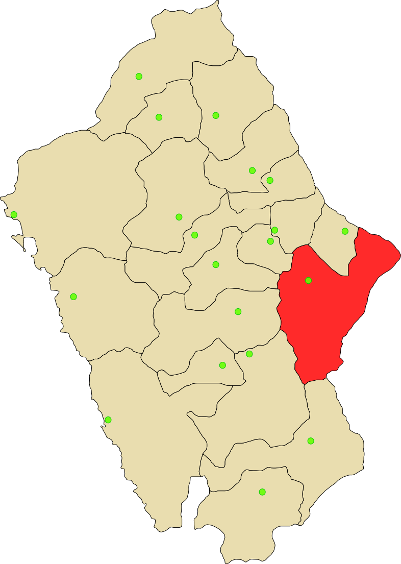 Provincia de Huari de departamento Ancash